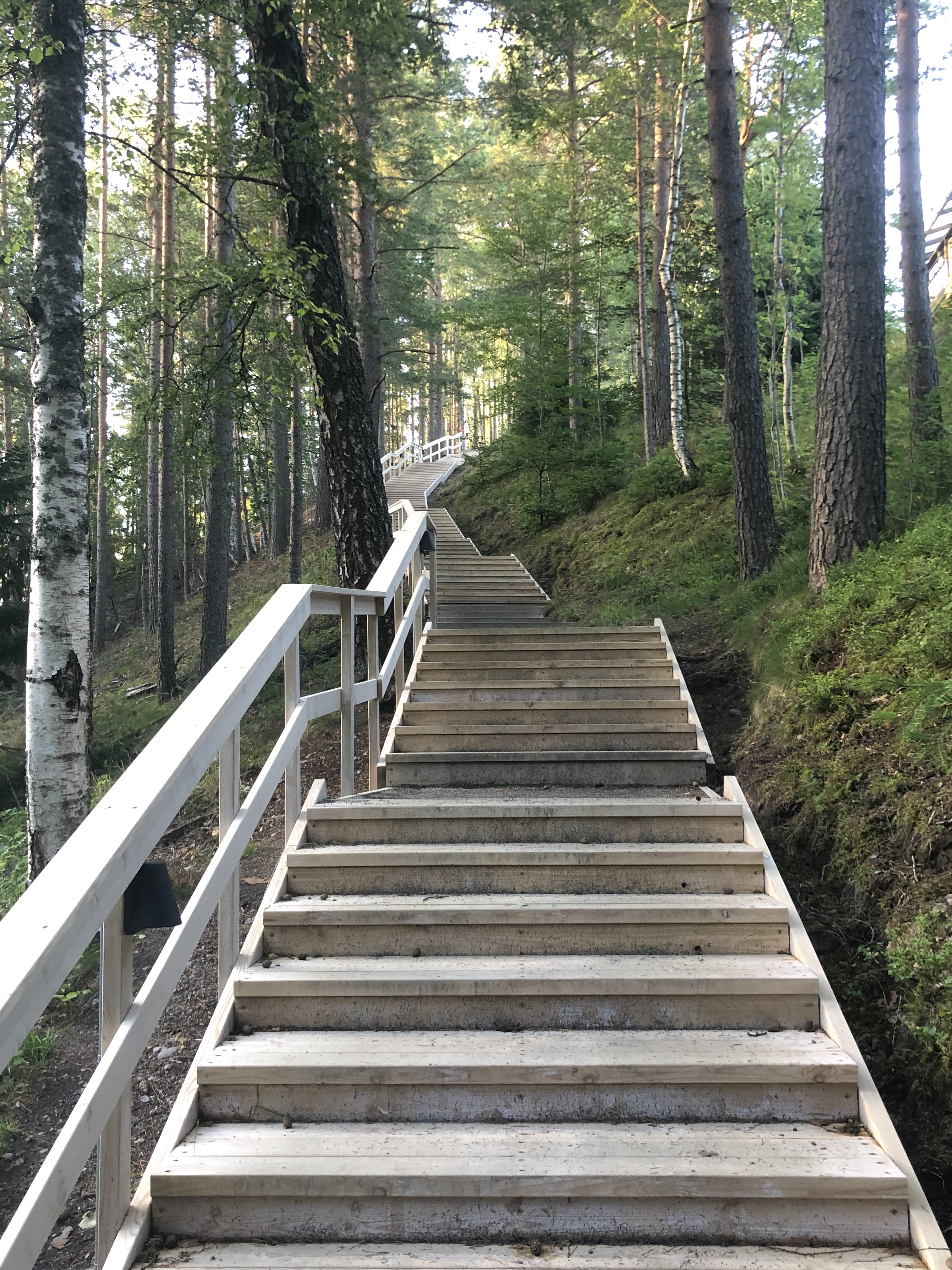 Träningstrappa på Rävåsen i Karlskoga